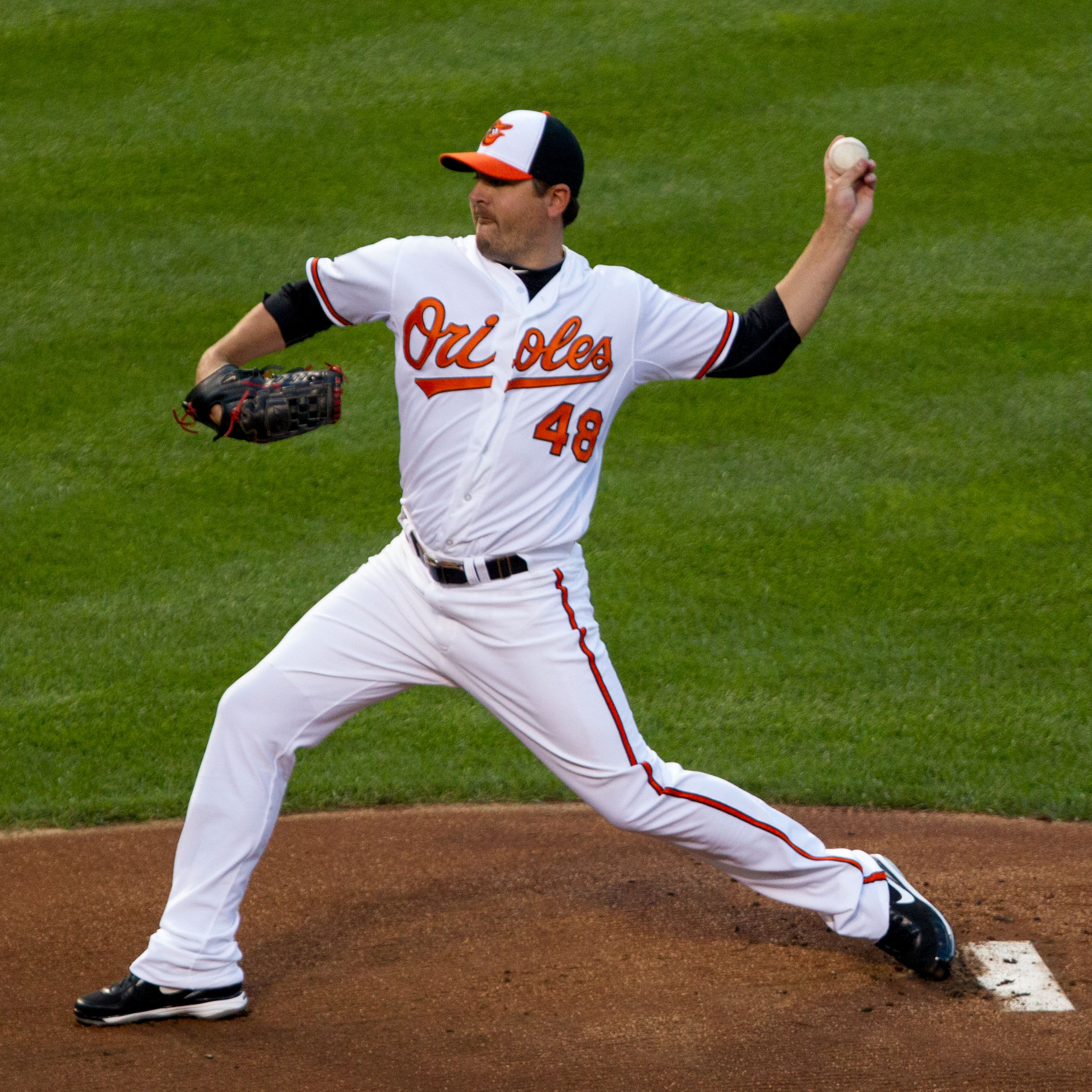 Joe Saunders